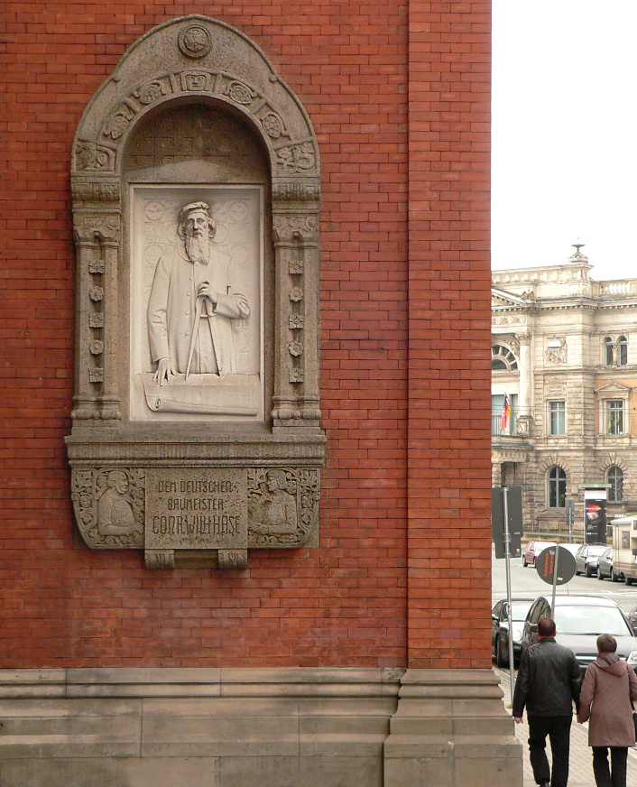 Hase Denkmal Künstlerhaus Hannover